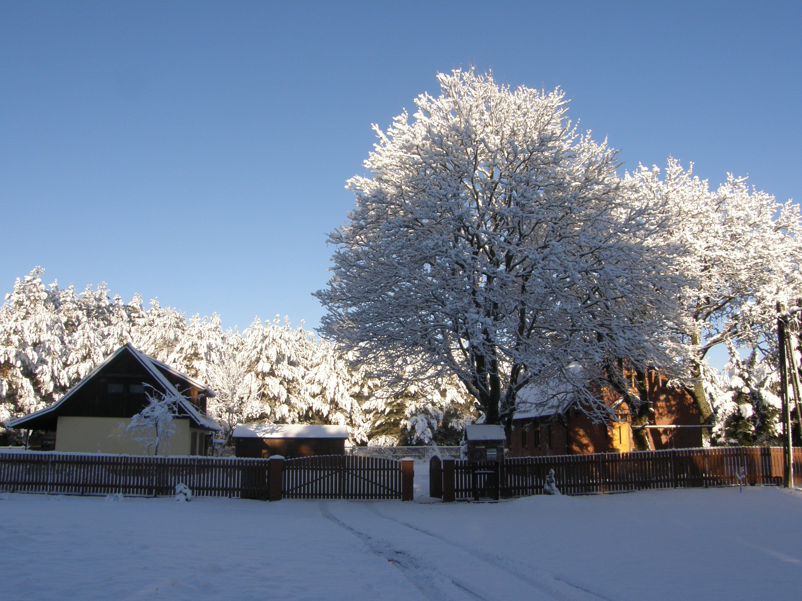 Boże Narodzenie 2014 - okiść